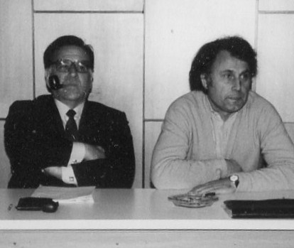 Gegenkandidatur Glombig Duve